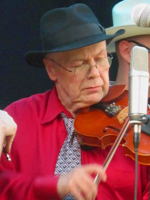 Jan Johansson - musician, composer, producer, teacher